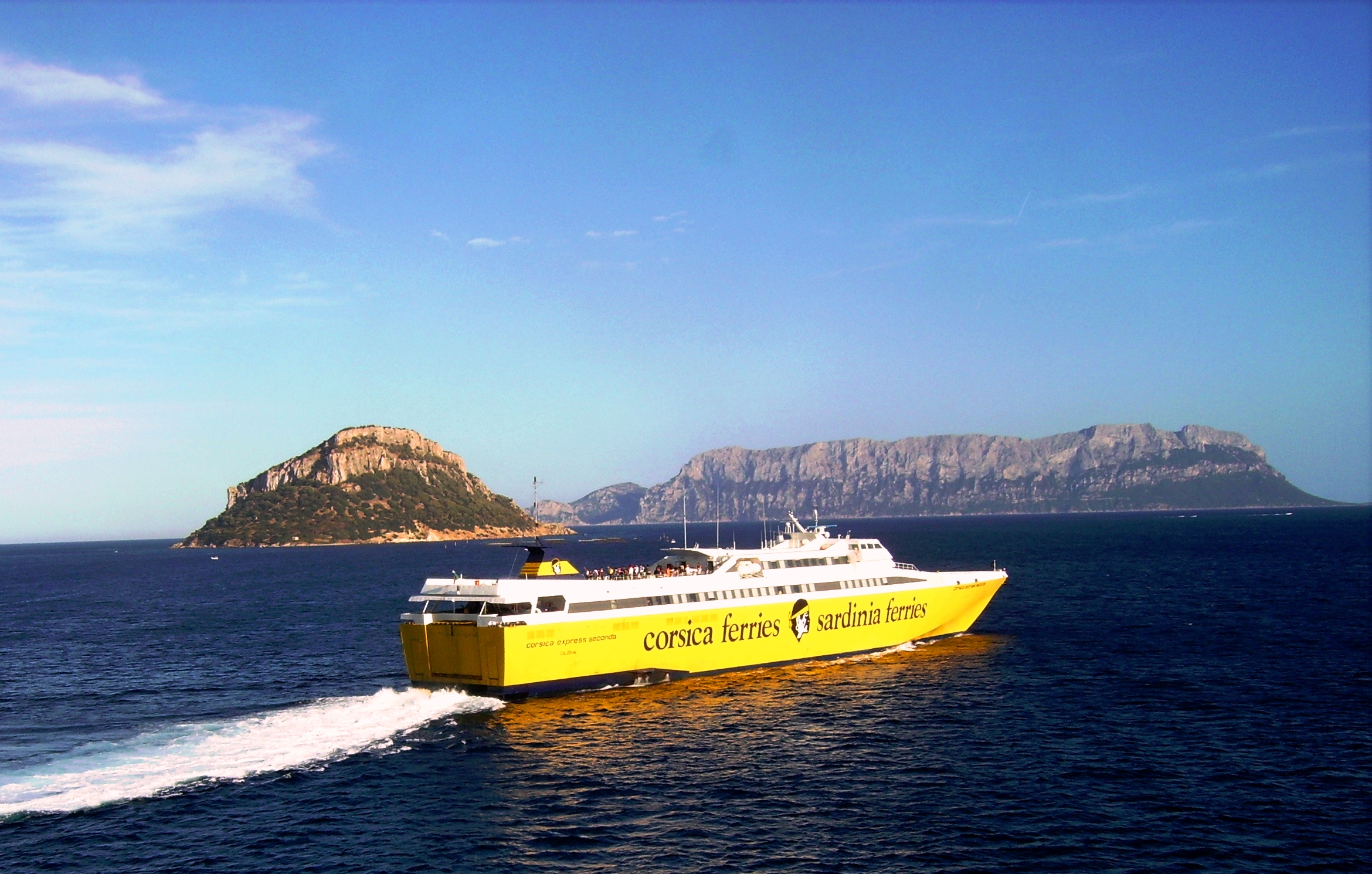 Sardegna - Golfo di Olbia. Nave veloce. Sullo sfondo l'isola di Tavolara; a sinistra l'isolotto di Figarolo. Corsica Express Seconda IMO number: 9125255 Own work --Shardan 02:24, 12 November 2006 (UTC) - (Sardegna, agosto 2006)